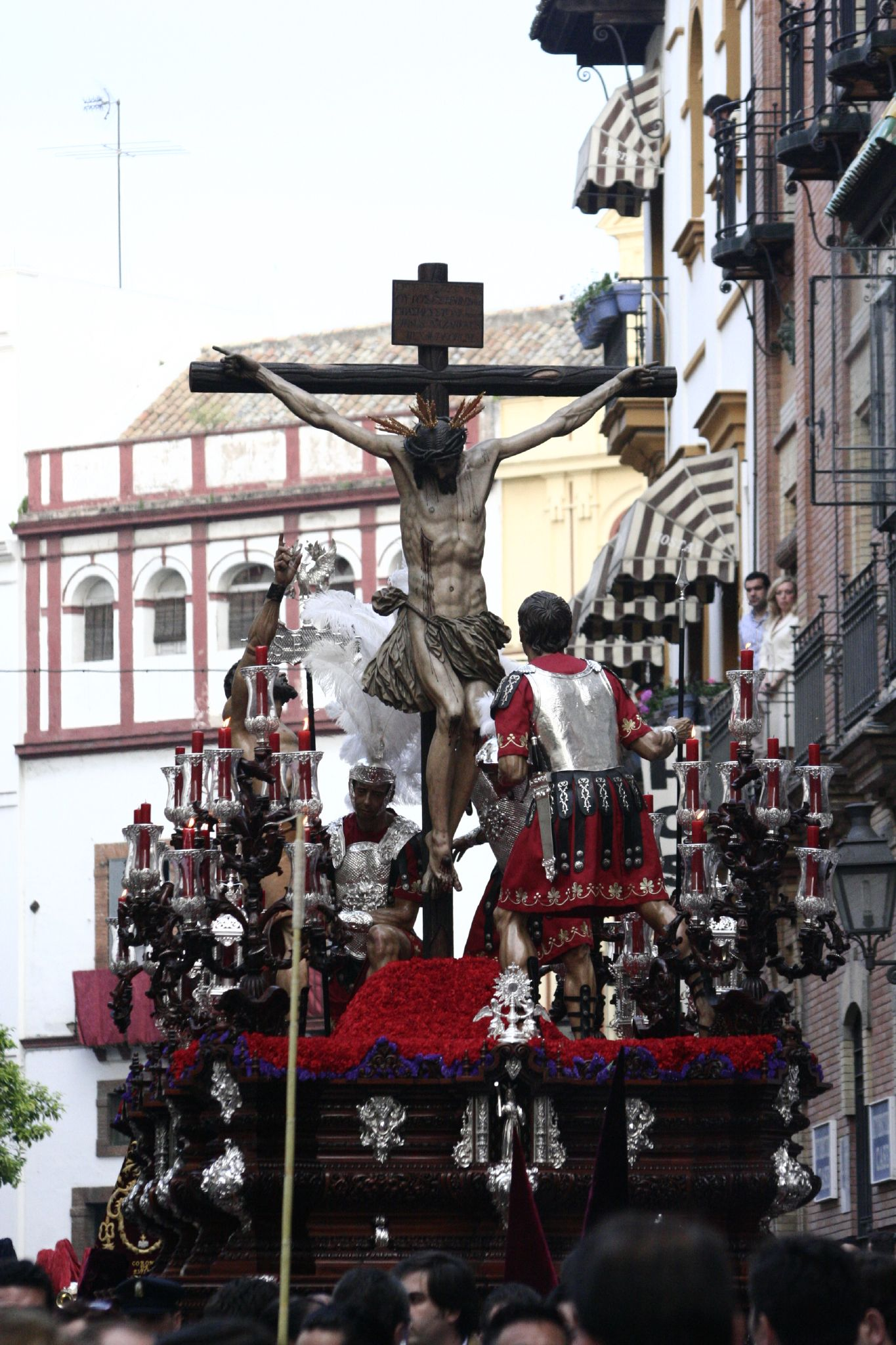 Cristo del Desamparo. Semana Santa en Sevilla. Año 2006 Foto realizada y propiedad de Ángel Cachón